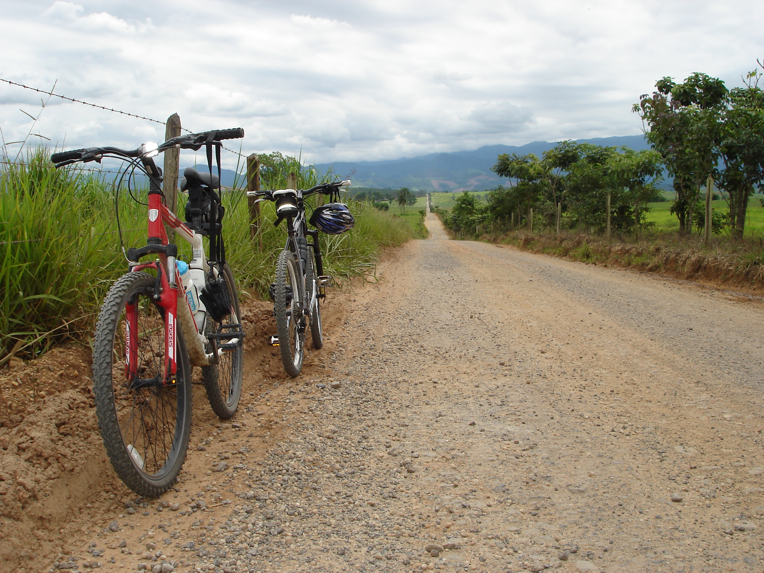 ciclismo, viagem de bicicleta